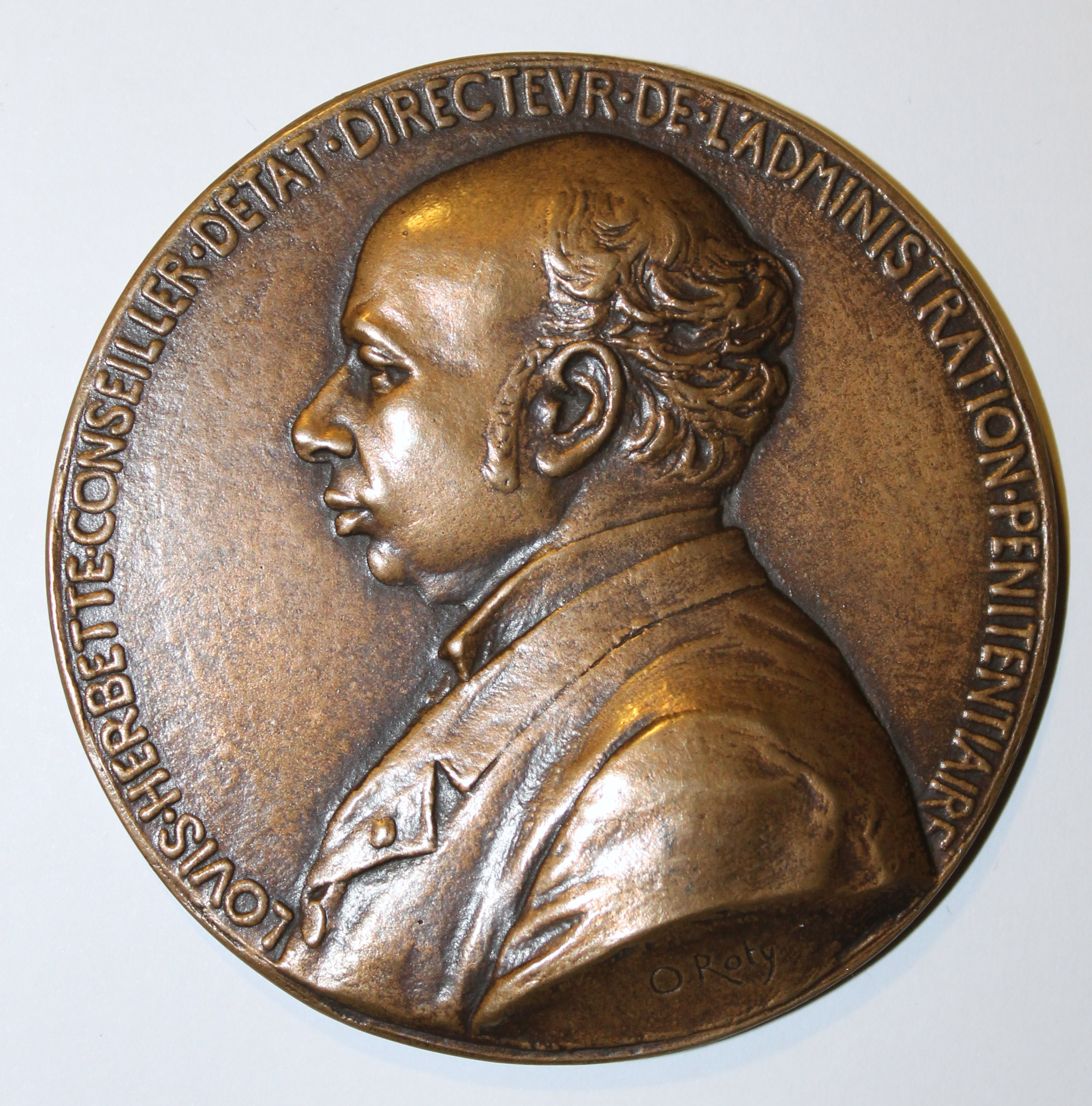 Médaille fondue (70 mm) de Louis Herbette (1843-1921), conseiller d'état, directeur de l'Administration Pénitentiaire, réalisée par le graveur Oscar Roty, éditée à l'occasion de Exposition universelle internationale en souvenir du diner amical du 8 juillet 1889, ses collaborateurs de l'exposition pénitentiaire spéciale. (Collection personnelle)